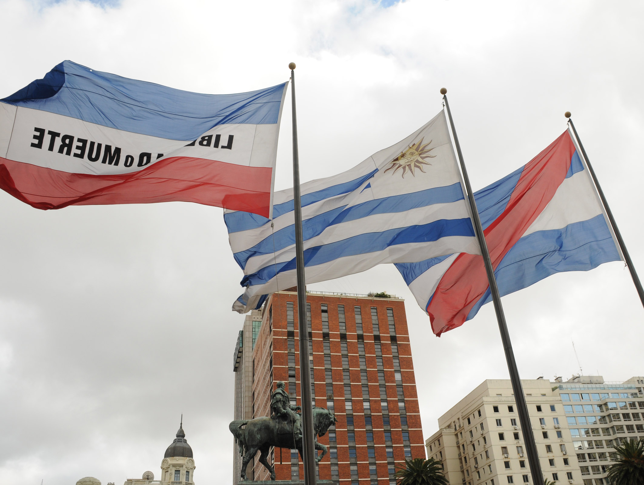 Banderas y Monumento Artigas en la Plaza Independencia